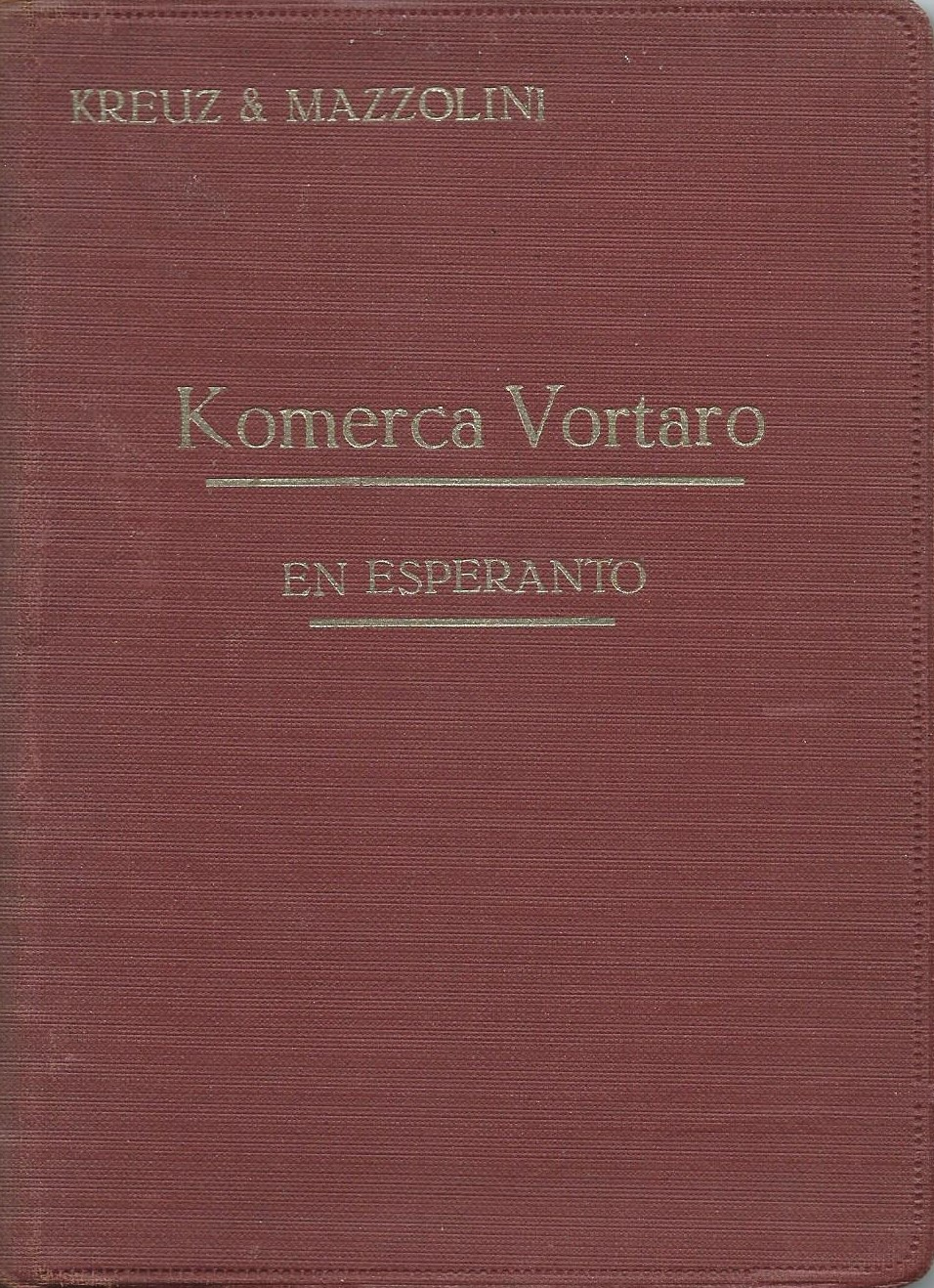 kovrilo de "Komerca Vortaro en Esperanto", 1927